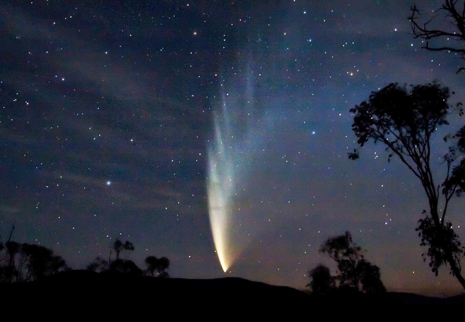 see Comet P1 McNaught02 - 23-01-07.jpg